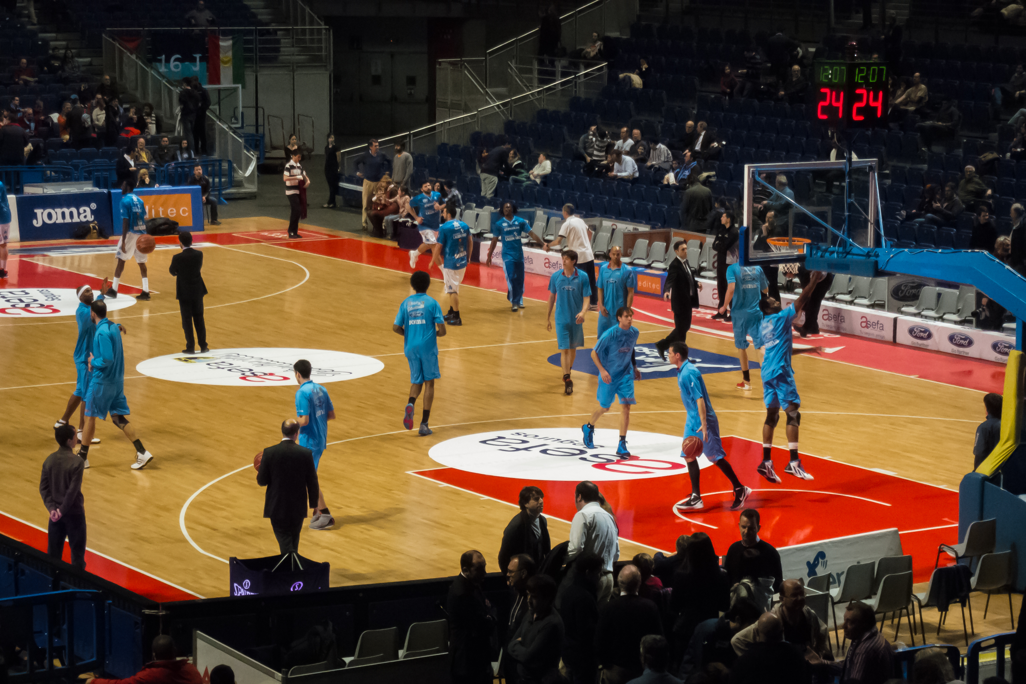 Entrenamiento previo al partido Estudantes - Lagun Aro de la Liga ACB. Palacio de los Deportes, Madrid.